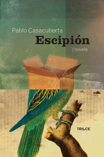 Tapa de libro publicado por Ediciones Trilce (Montevideo, Uruguay)